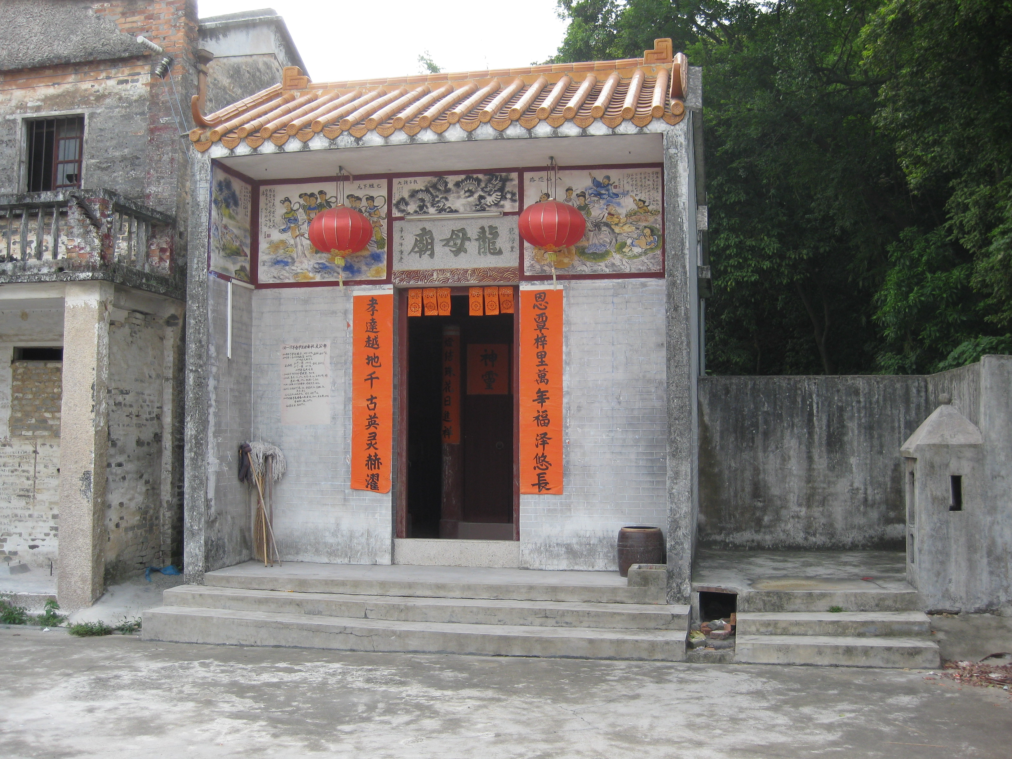 潭冈乡龙湾里龙母庙